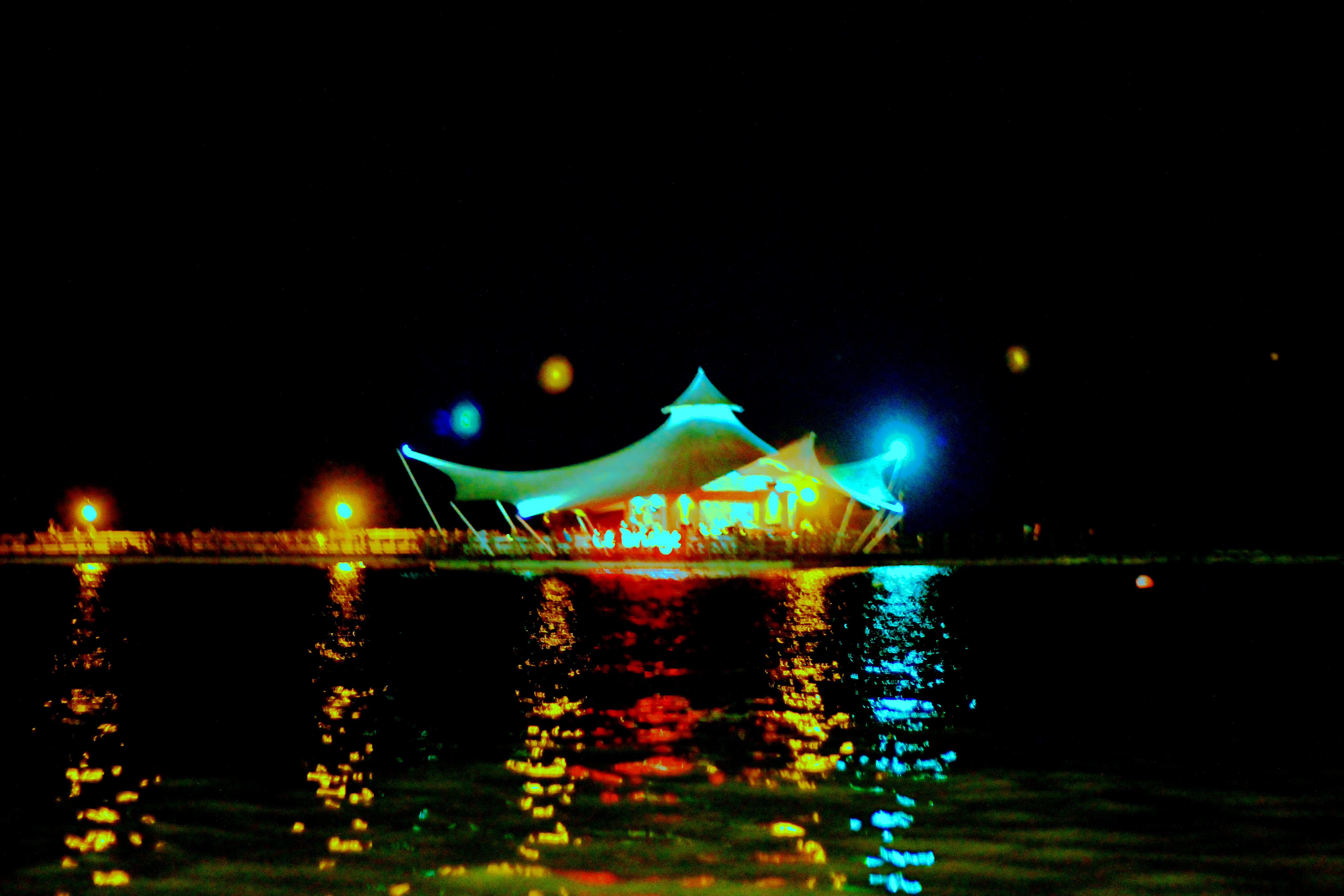 La bridge Ancol Jakarta